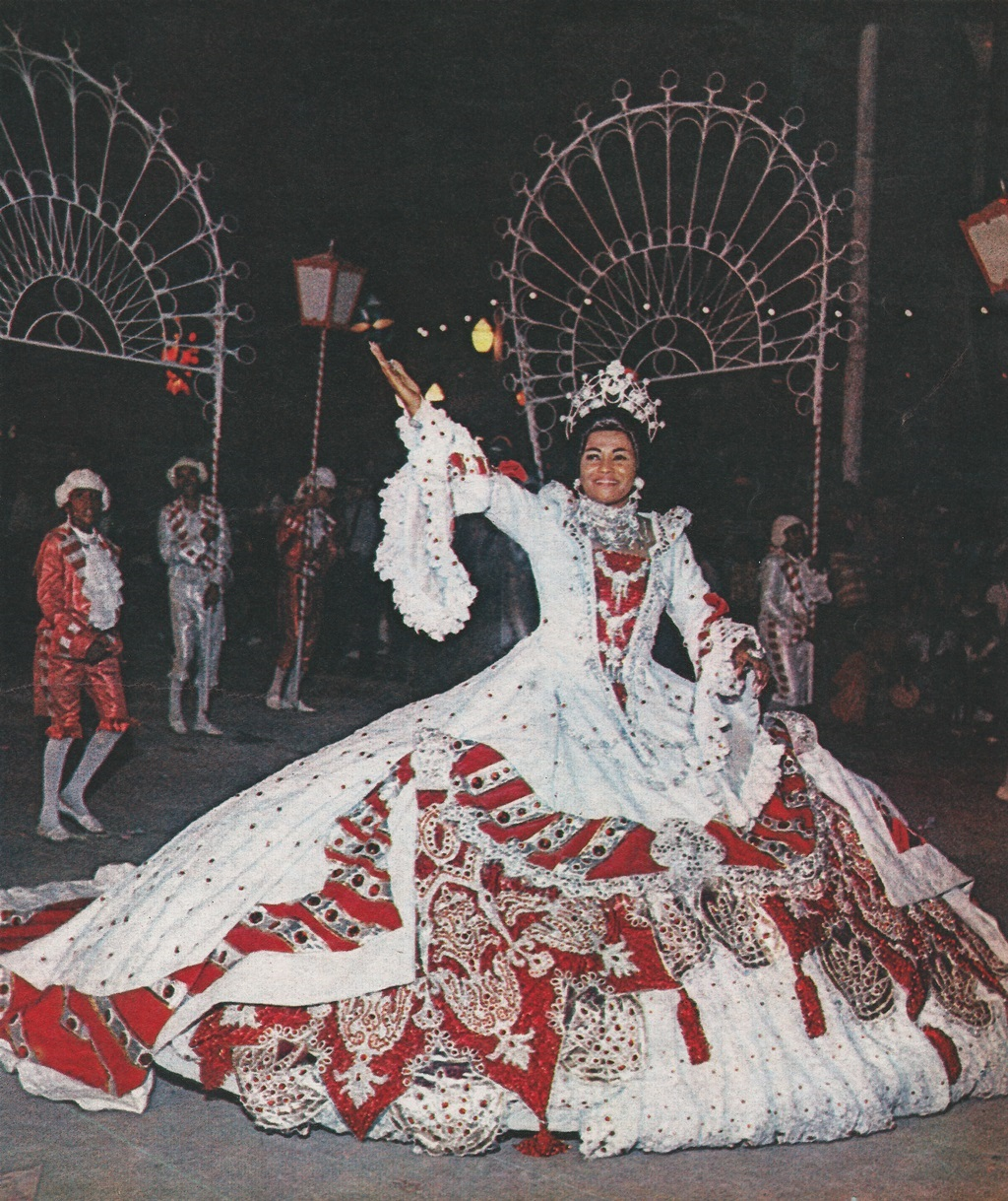 Acadêmicos do Salgueiro, 1967